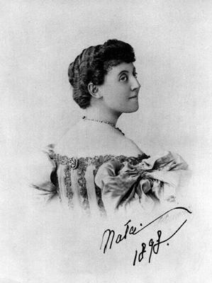 Анастасия Николаевна Маннергейм, ур. Арапова (1872—1936)